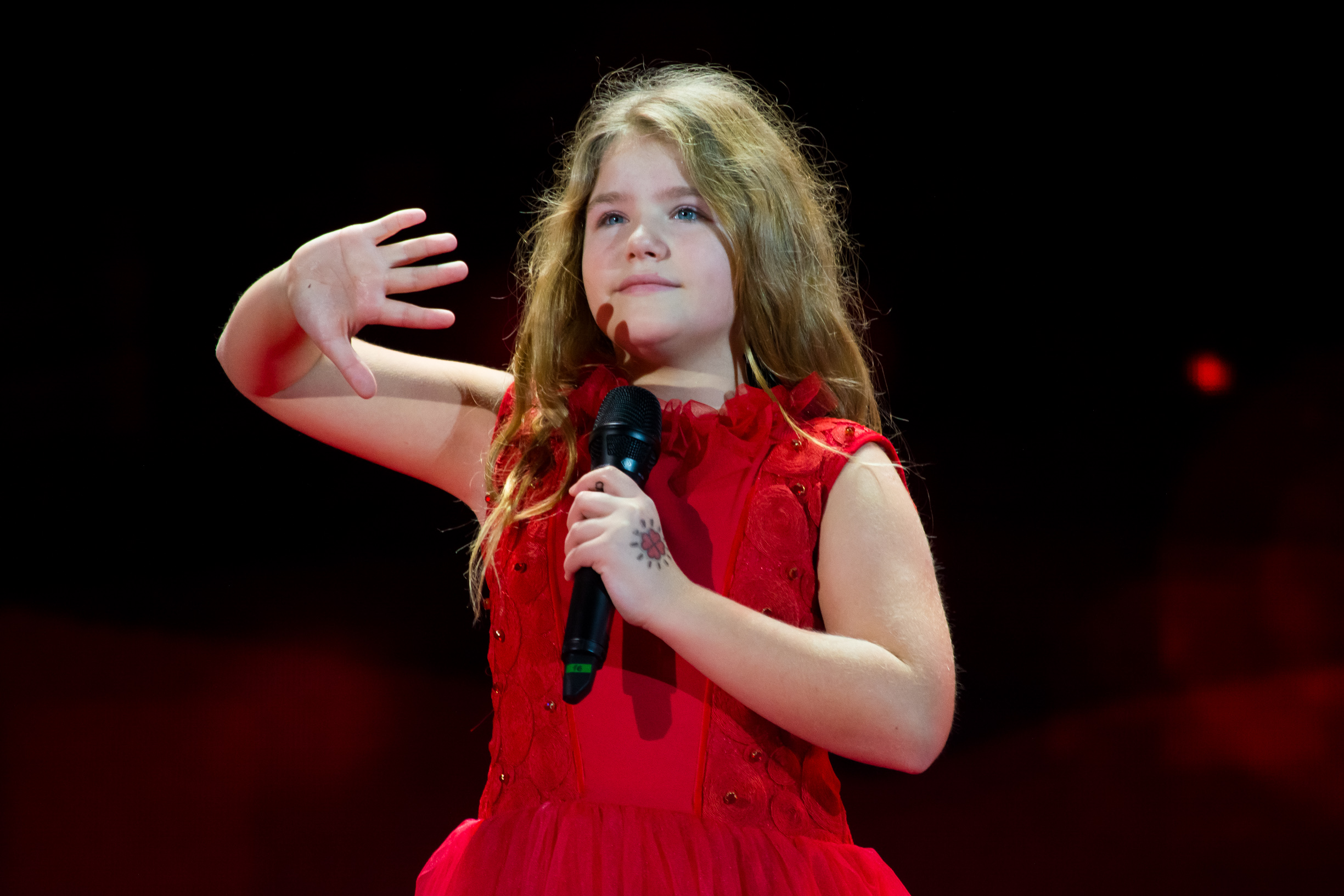 Лена Стаменкович на сцене Детского Евровидения 2015 («Армеец», София) во время генеральной репетиции